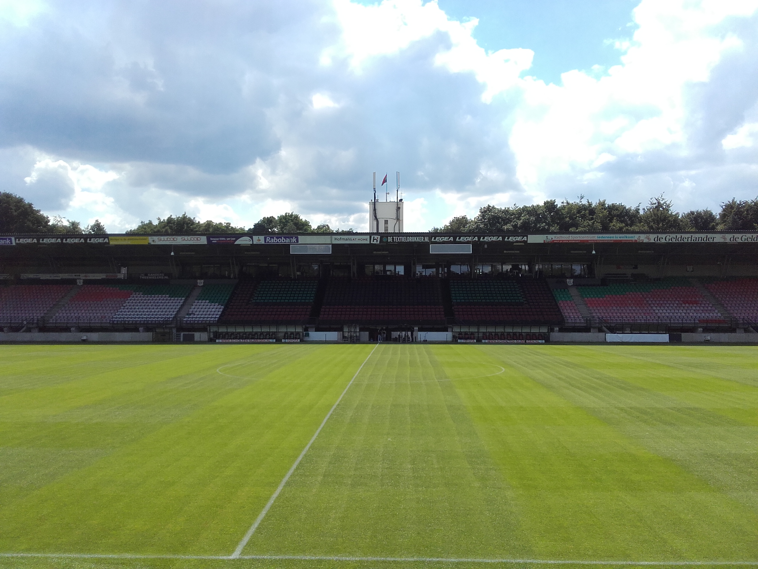 Hoofdtribune